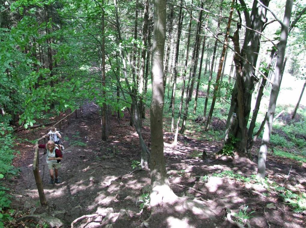 Zejście na przełęcz Stachurówki